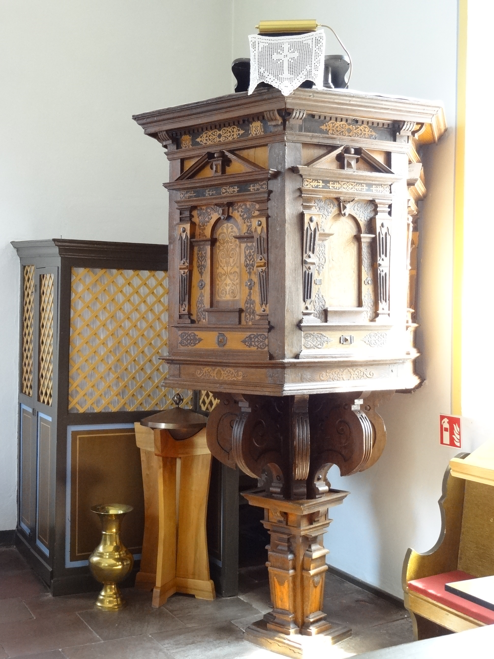 Evangelische Kirche (Hausen-Oes)